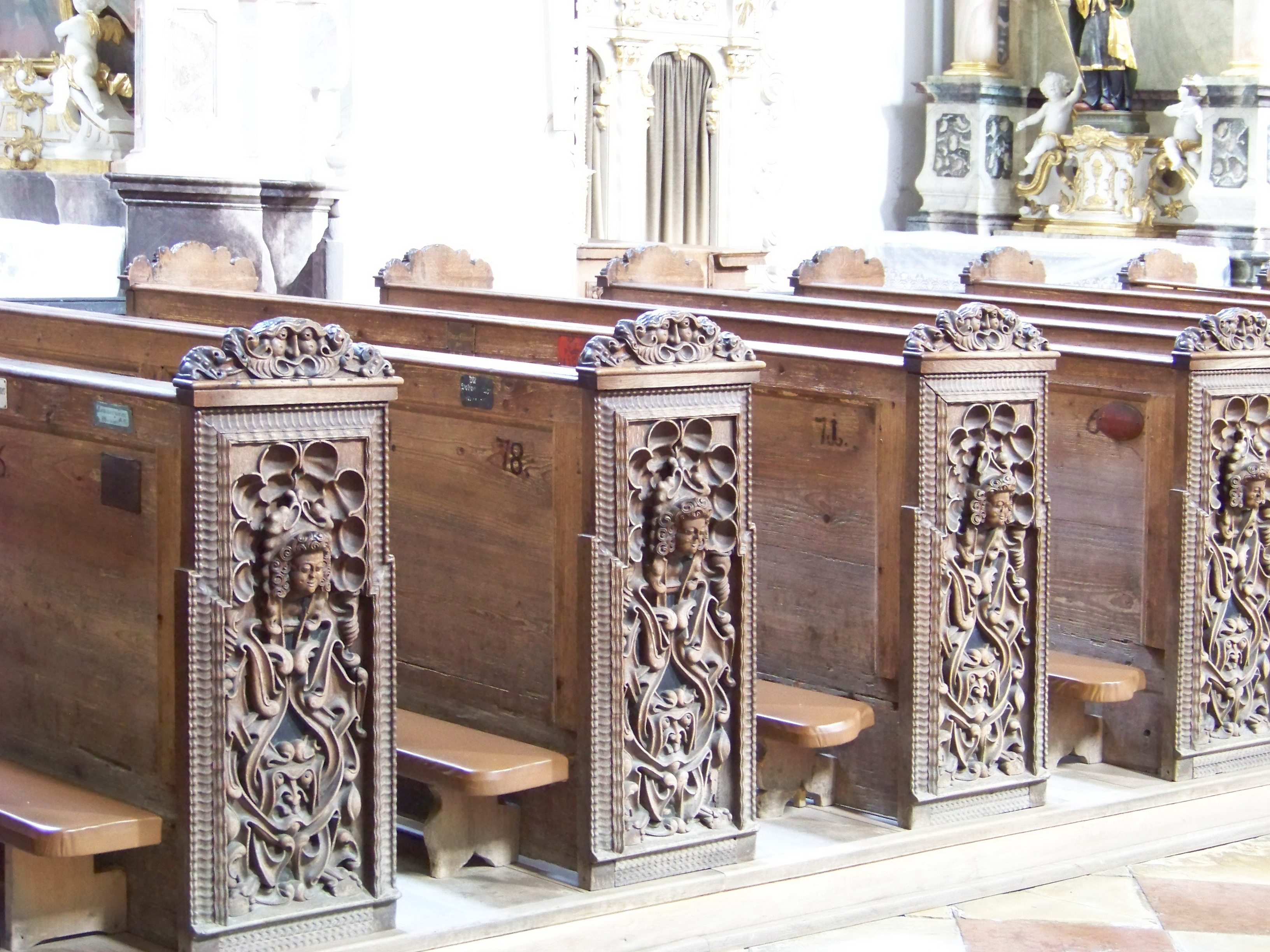 Mallersdorf-Pfaffenberg, Klosterberg 2. Katholische Pfarrkirche, ehemalige Klosterkirche St. Johannes Evangelist. Türme, Langhauskern und Westportal vor 1265, Chor 1463, wesentlicher Umbau 1613, Vorbau um 1755, Ausstattung im Laufe des 18. Jahrhunderts. Stuhlwangen mit geschnitzten Wangen. Das rechteckige Feld bekrönt ein Maskenaufsatz.